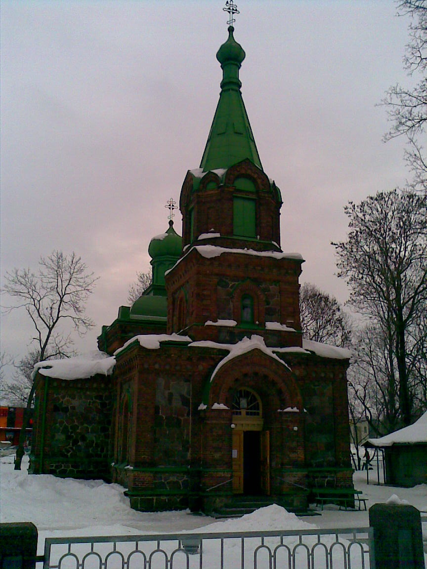 Йыхвиская православная церковь